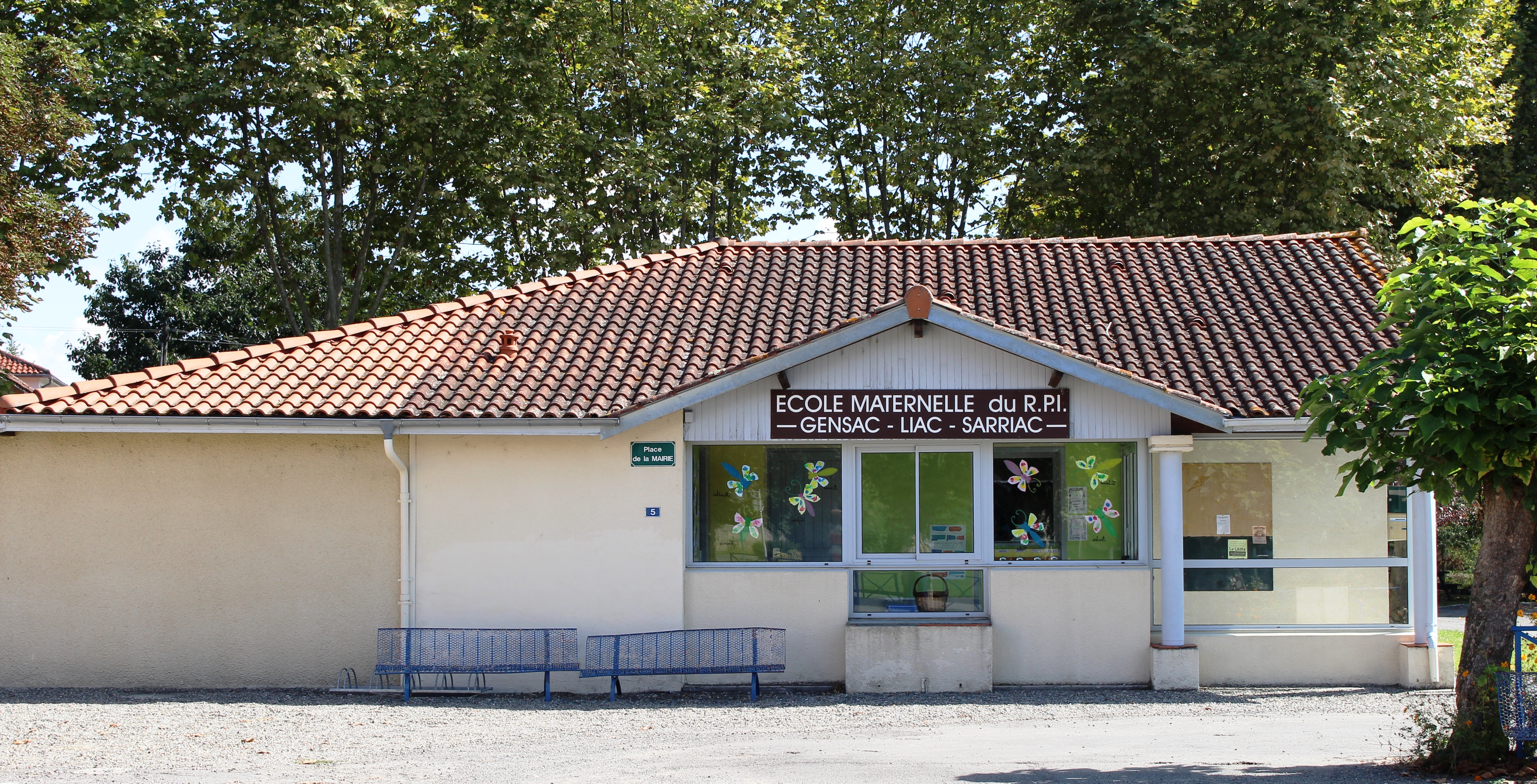 École de Liac (Hautes-Pyrénées)